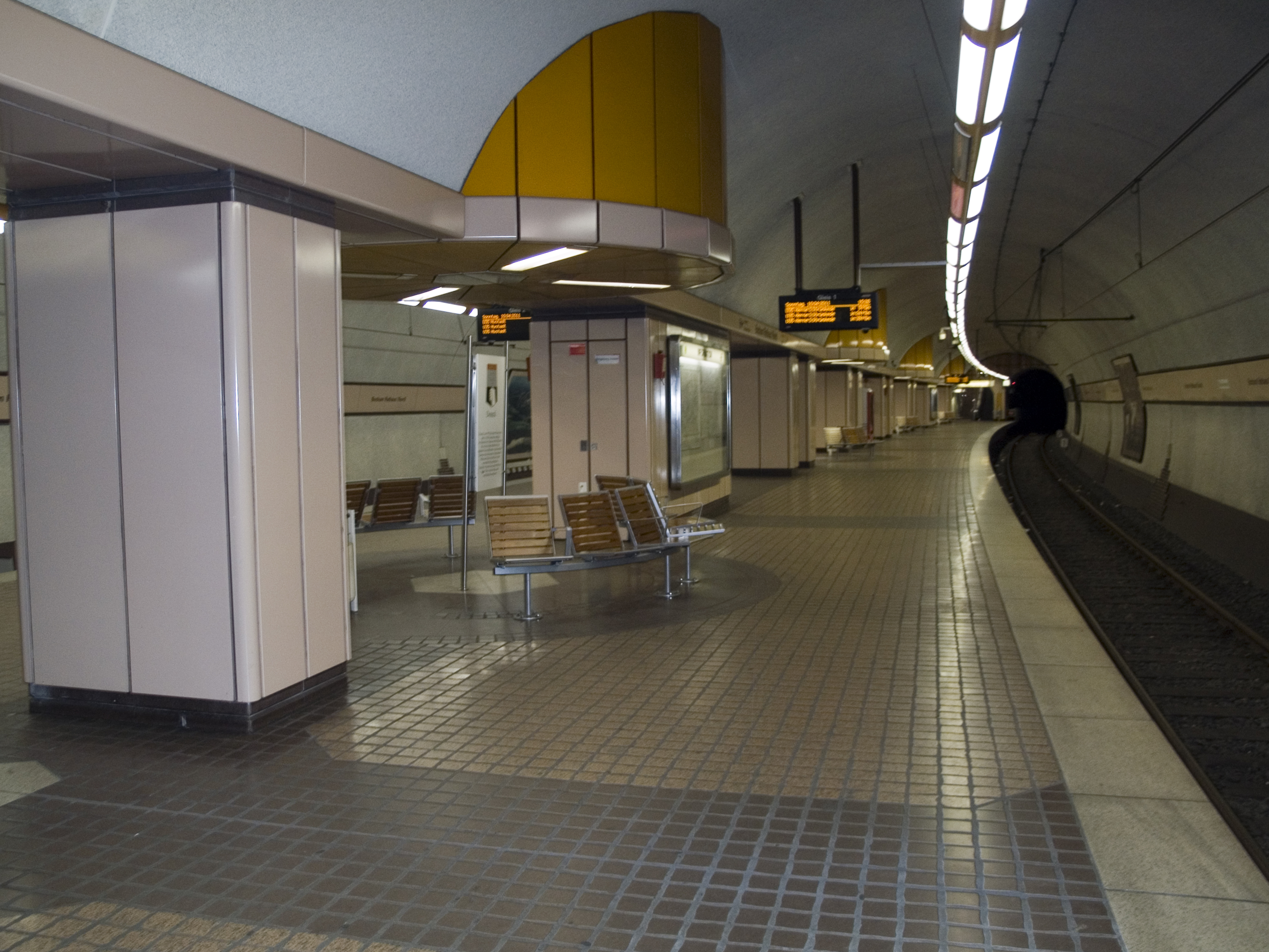 Северный рейн - Вестфалия. Бохумский скоростной трамвай - станция Rathaus-Nord